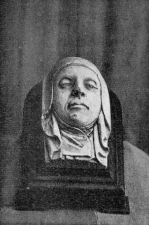 Cabeza de la estatua yacente de Angelina de Grecia (conservada en la colección del Sr. General Ezpeleta)